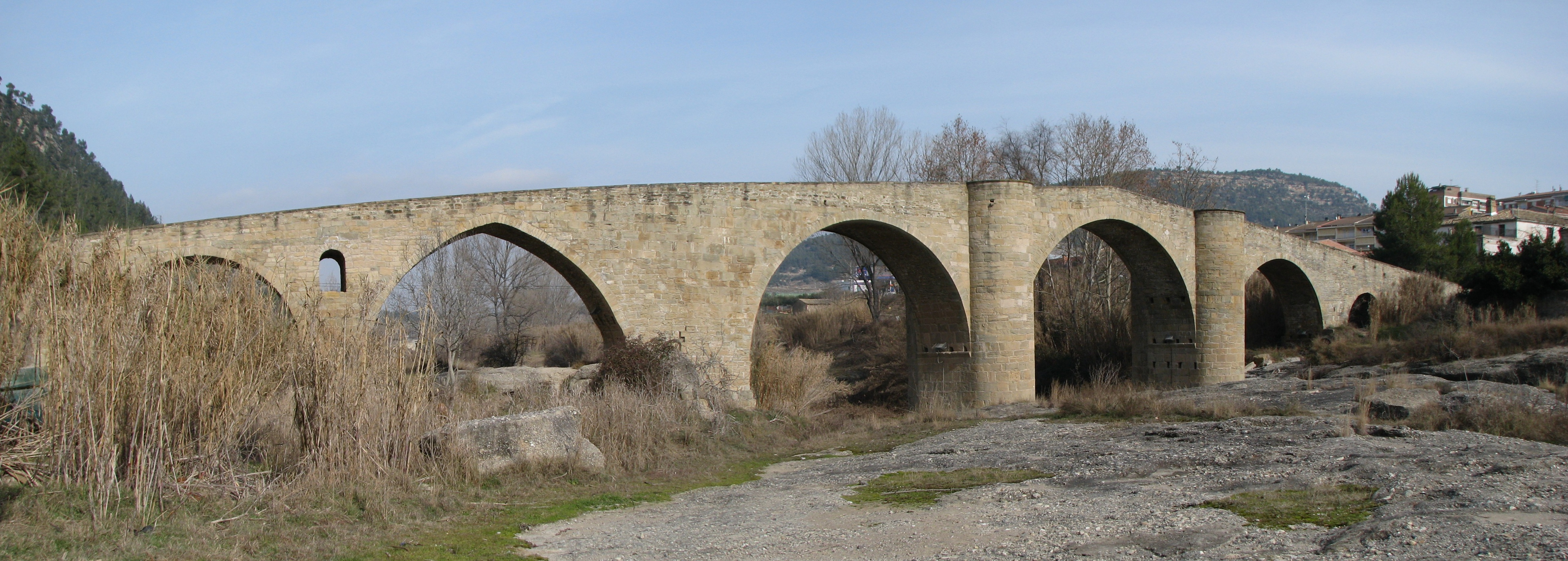 Pont gòtic del Pont de Vilomara i Rocafort